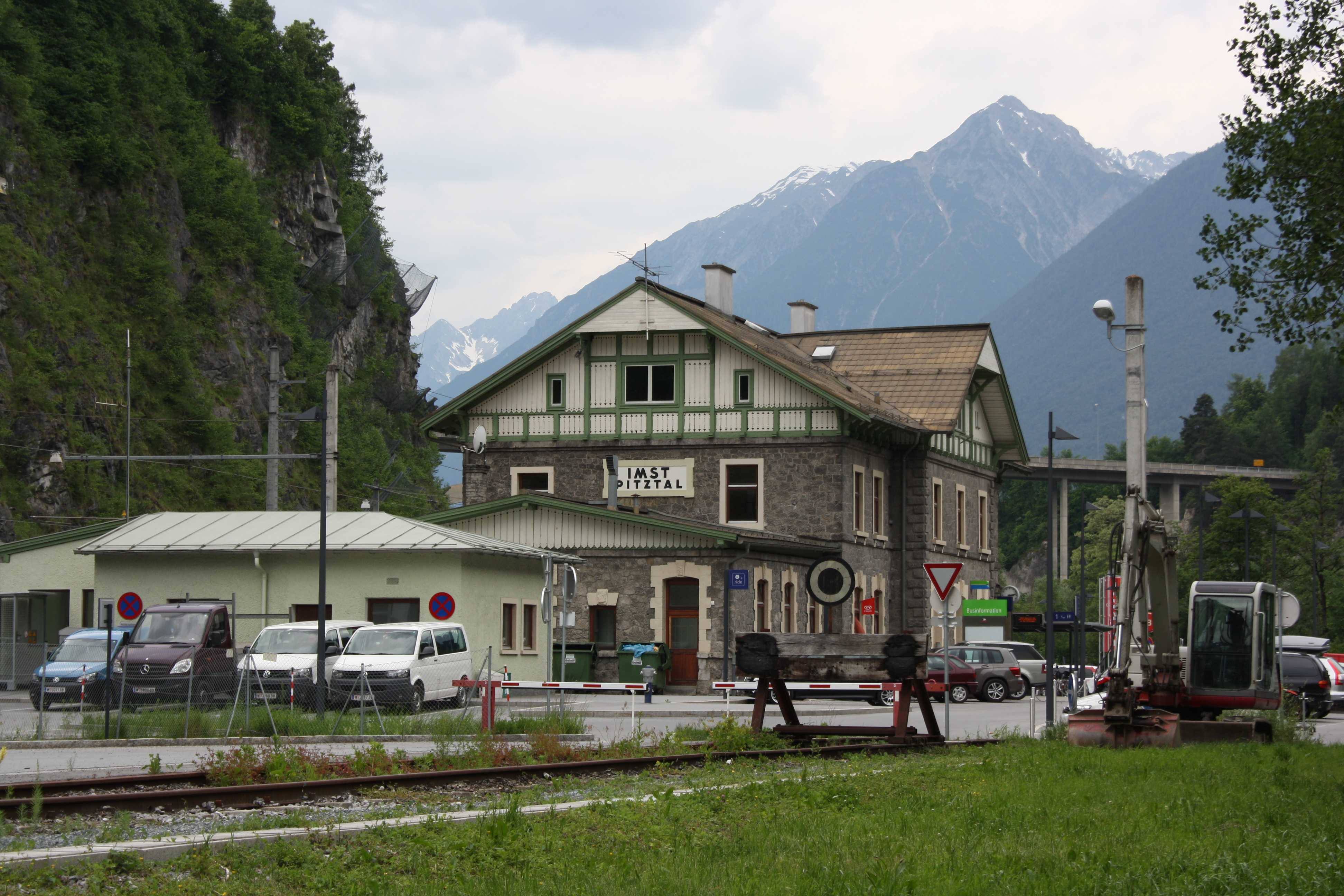 Aufnahmsgebäude des Bahnhofs Imst-Pitztal, Blickrichtung Westsüdwest. Der dominierende Gipfel oberhalb der Brücke ist der Obere Eisenkopf (2373 m), links daneben das Grubigjoch (2586 m). Hinten im Tal erkennt man Silberspitze (2461 m) und Kreuzjochspitze (2672 m).